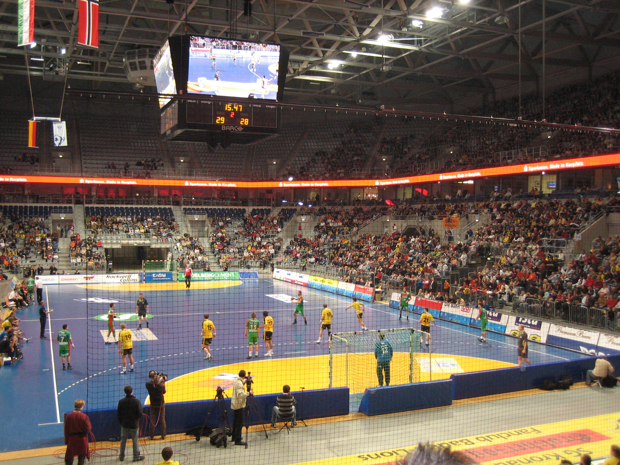 SAP-Arena. Spiel Rhein-Neckar Löwen gegen SC Magdeburg Gladiators. EHF-Cup Achtelfinal Rückspiel. SC Magdeburg ist im Angriff